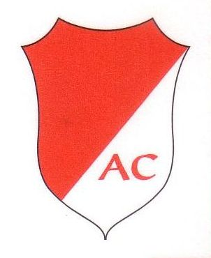 Wappen des AC zu Hamburg